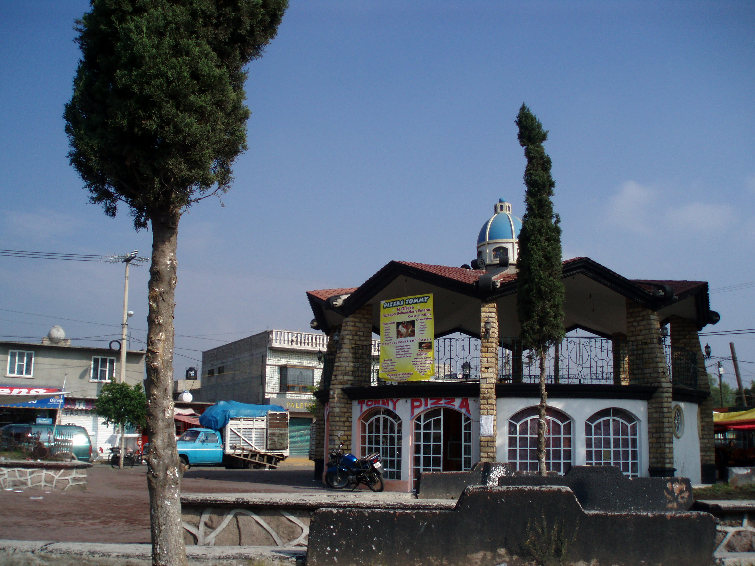 Kiosco de San Pablo de las Salinas.